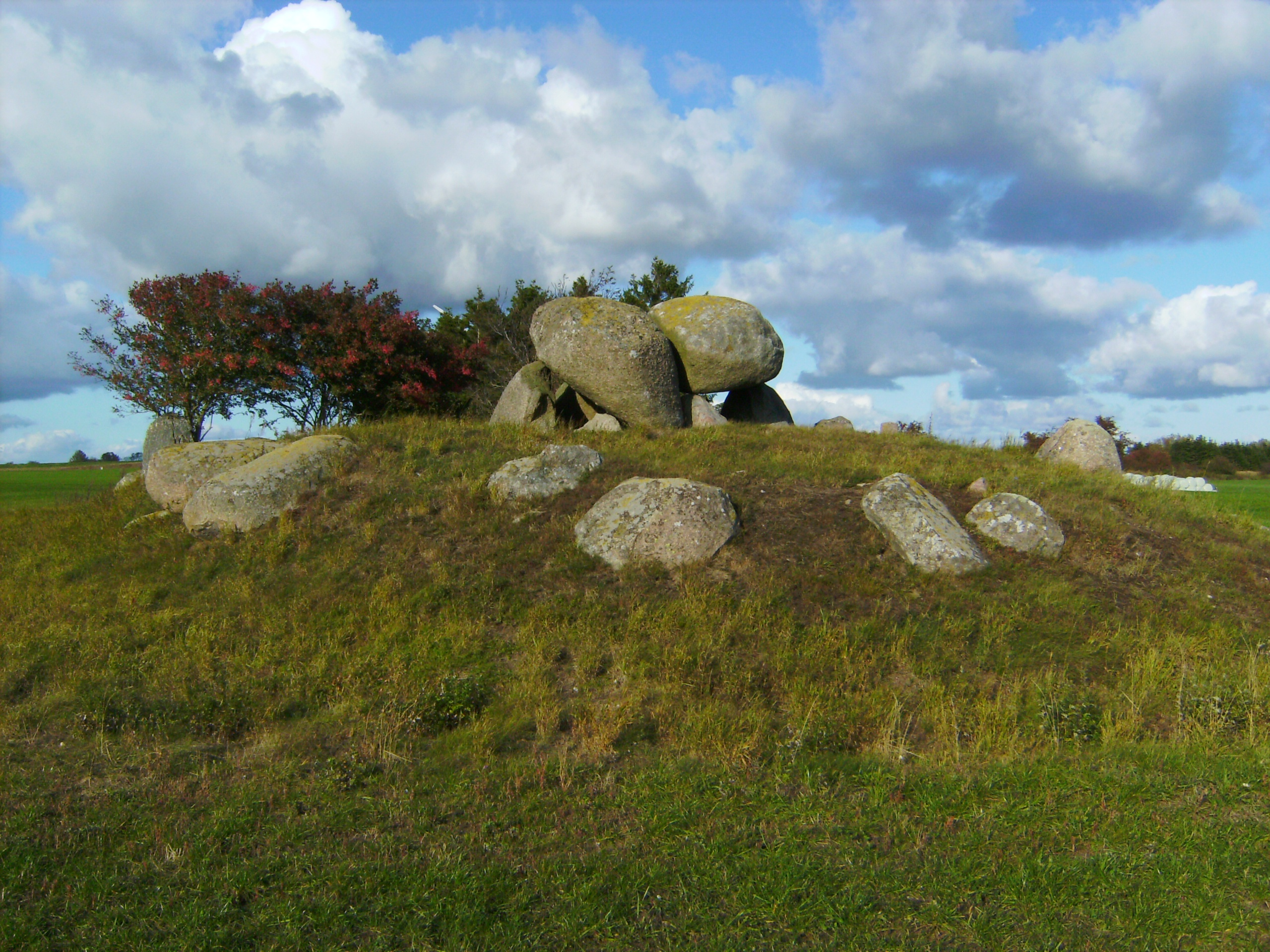 Oldtidsgrave ved Lågerup nord for Nysted Dolmens north of Nysted, Denmark